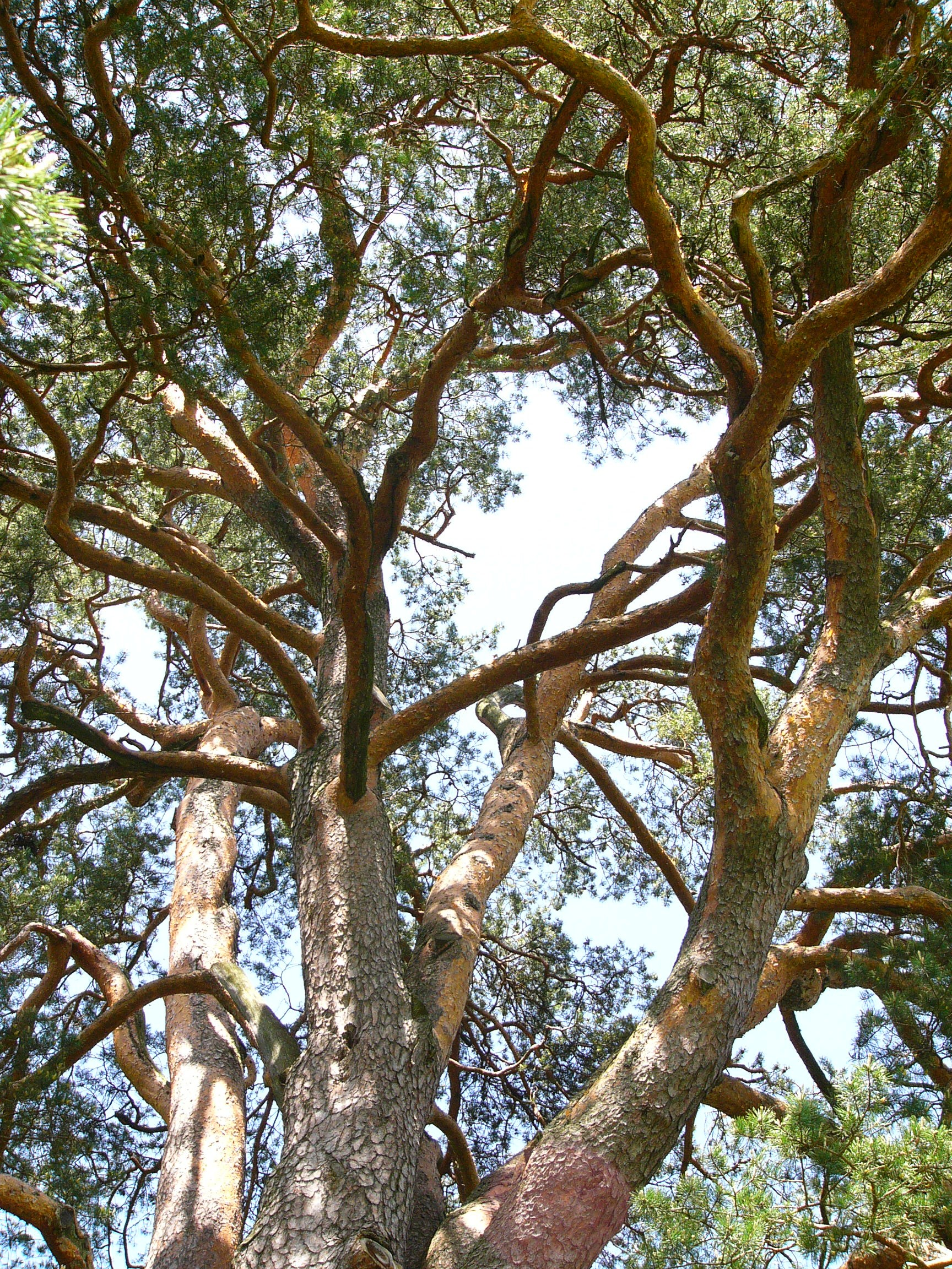 Veľké Borové, borovica lesná (Pinus sylvestris), Strom roka 2004